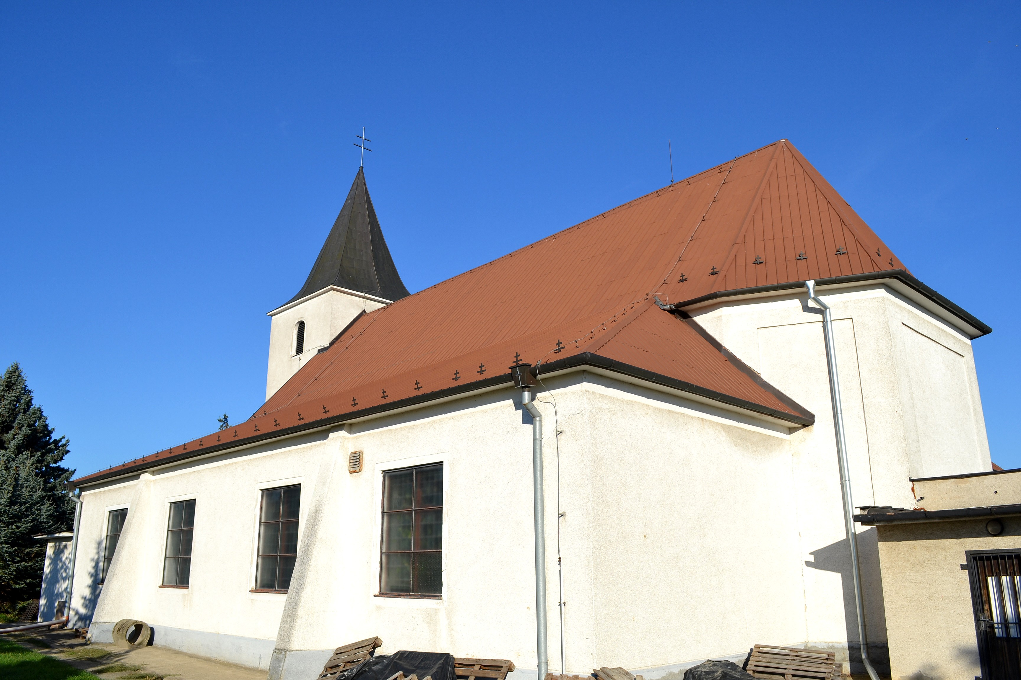 Majcichov (okr. Trnava), Kostol Všetkých svätých; celkový pohľad